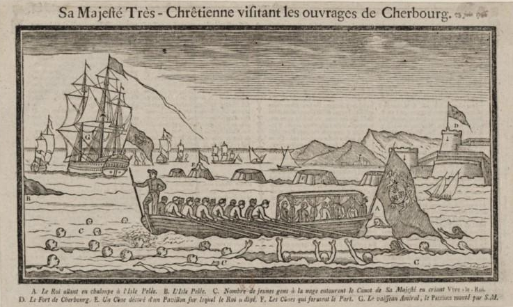 Sa Majesté très chrétienne visitant les ouvrages de Cherbourg, Lortsche. Graveur Estampe, gravure sur bois Identifiant : ark:/12148/btv1b8410506j Source : Bibliothèque nationale de France, département Estampes et photographie, RESERVE FOL-QB-201 (116) Relation : Appartient à : [Recueil. Collection Michel Hennin. Estampes relatives à l'Histoire de France. Tome 116, Pièces 10092-10183, période : 1786-1788] Relation : Description : Référence bibliographique : Hennin, 10106